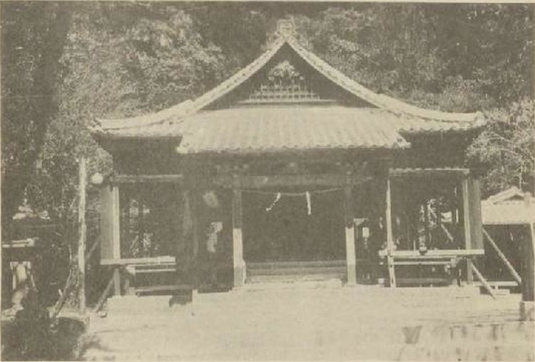 伊集院町志に掲載されている徳重神社の本殿の写真。